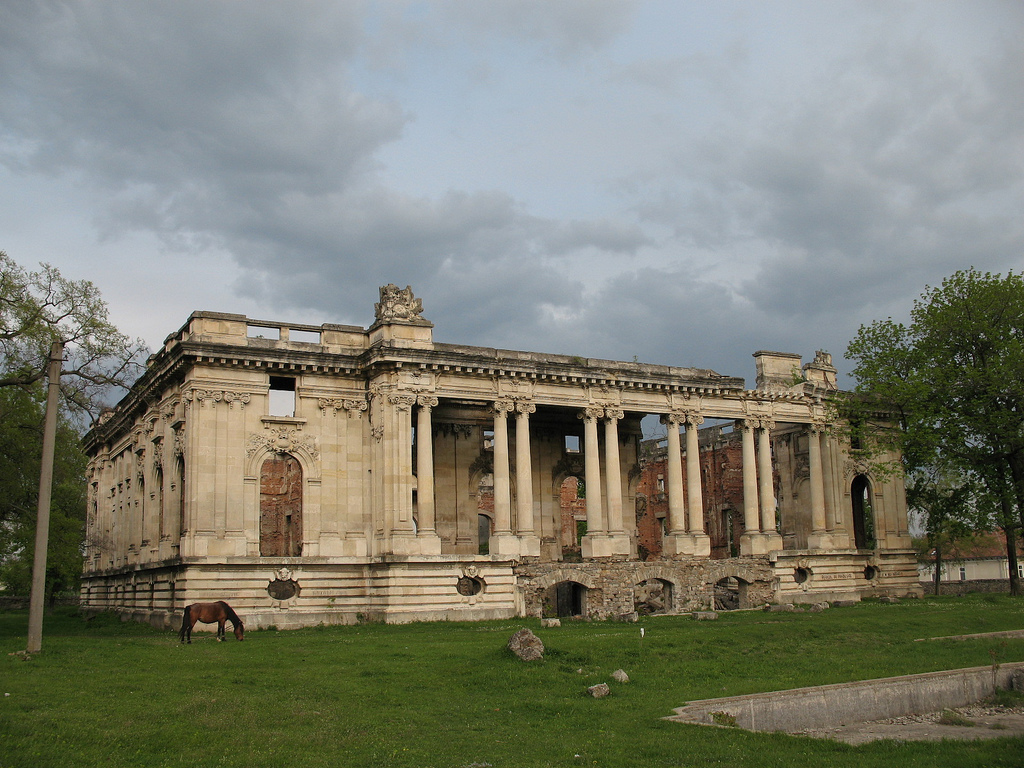 IMG_6570 01